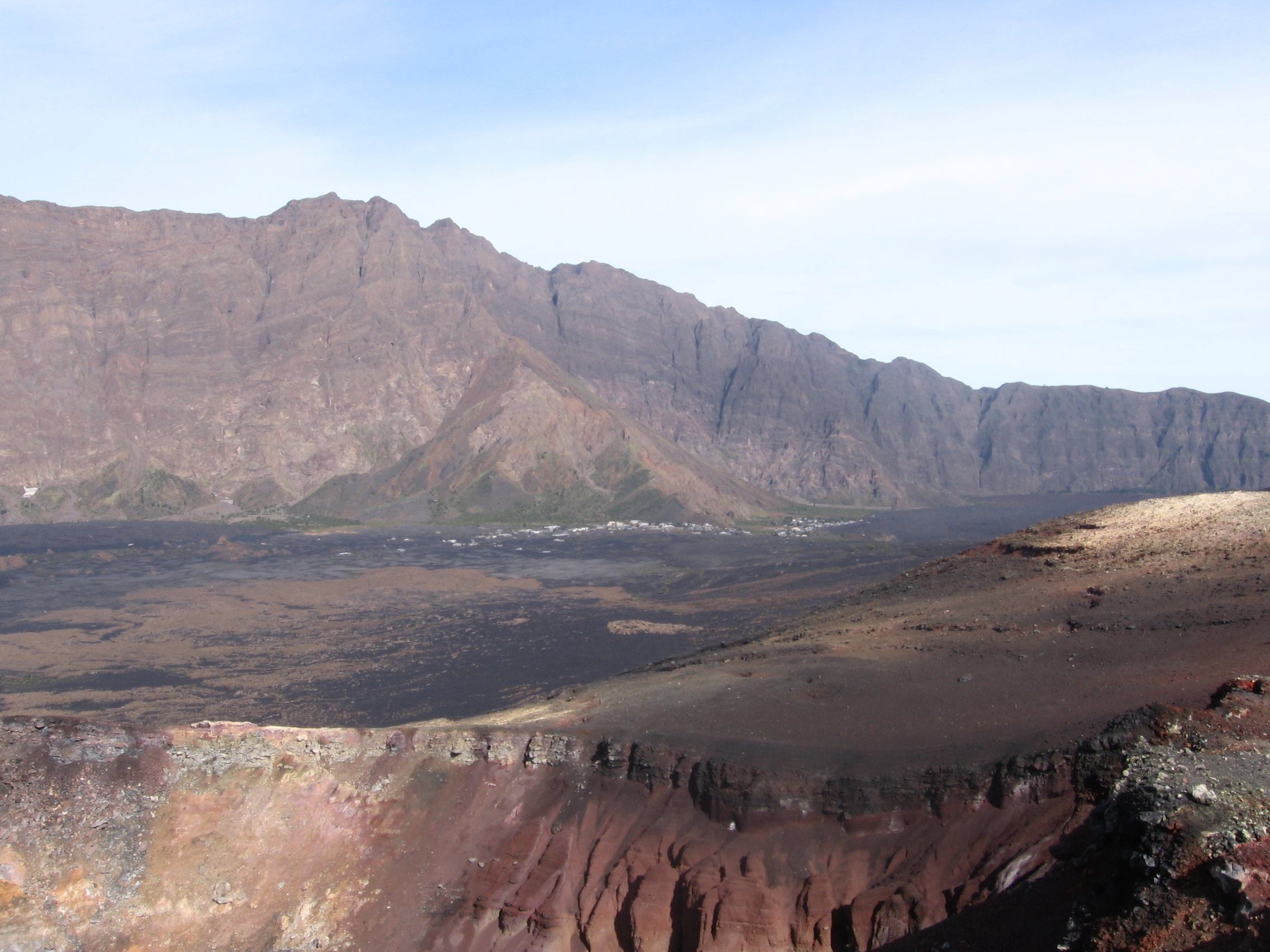 Vista das povoações da Portela e de Bangaeira, na Chã das Caldeiras, Ilha do Fogo, Cabo Verde